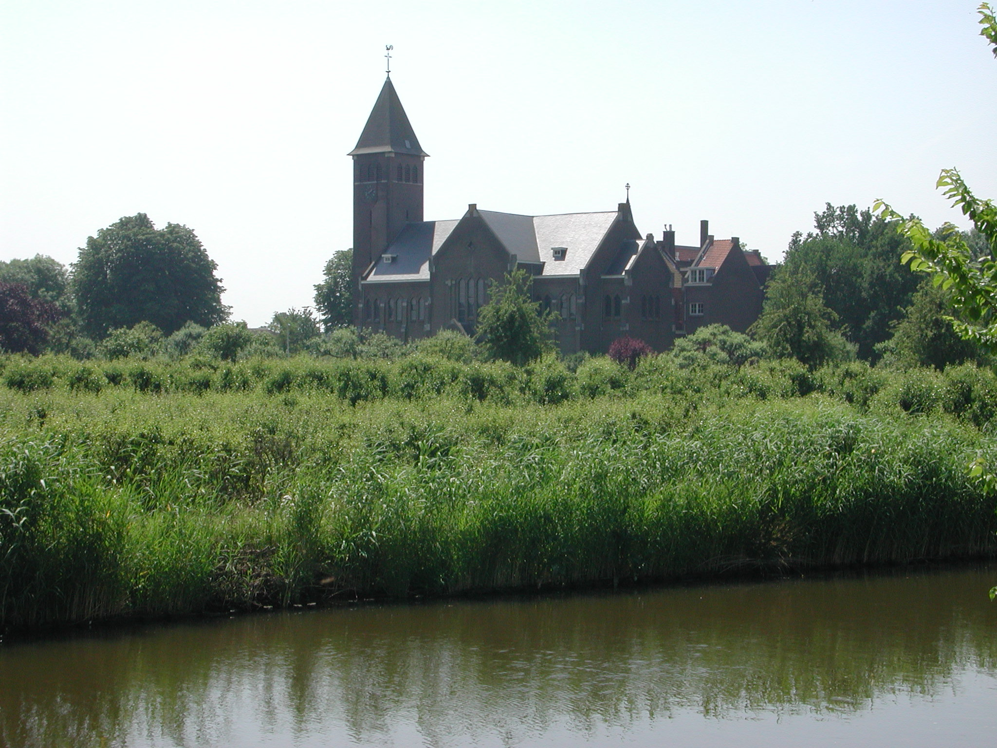 Klooster Sint Gabriel, kloosterorde Passionisten, Haastrecht. Auteur P.H. Louw, eigen werk, vrij gebruik.